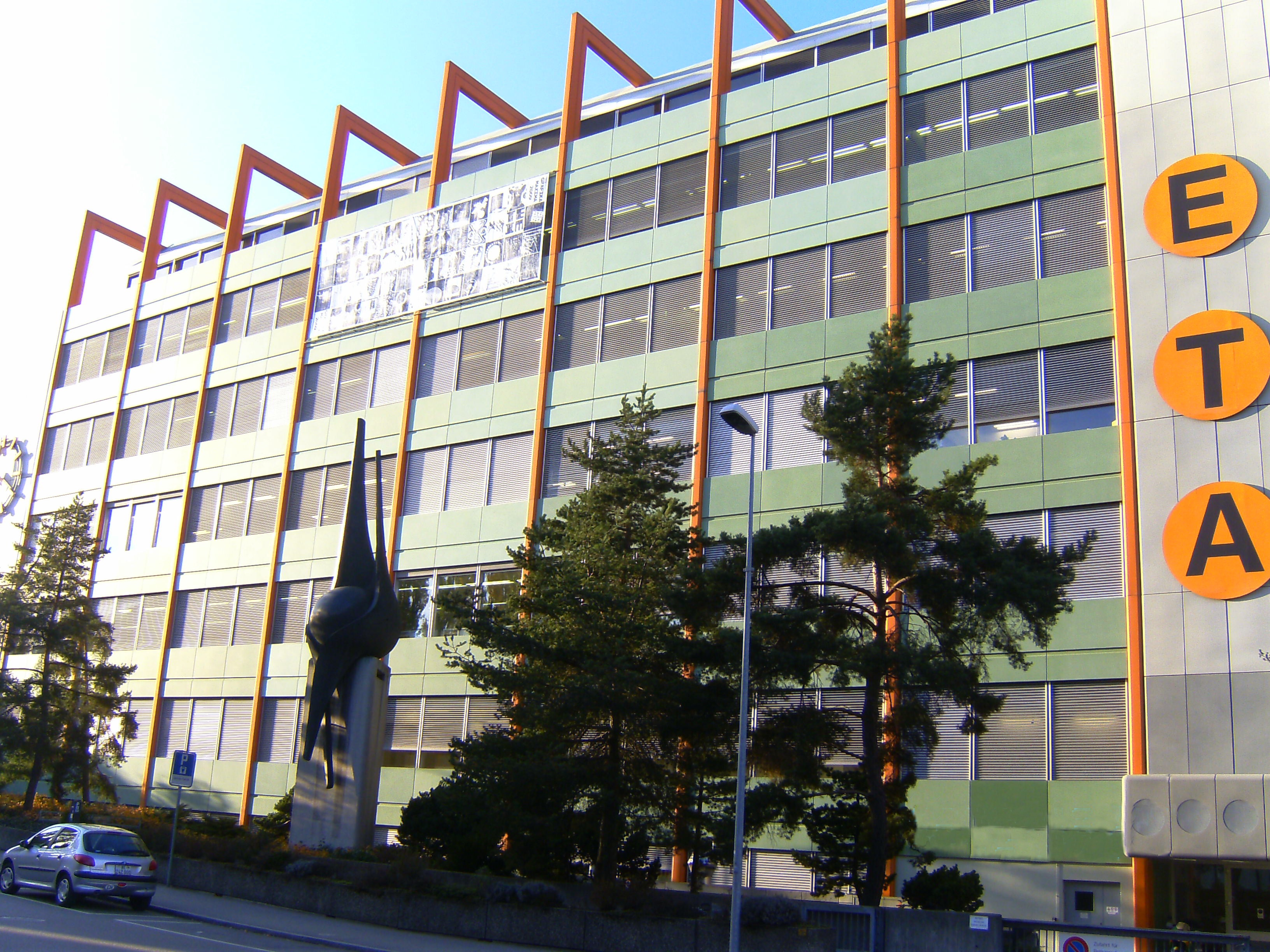 ETA SA ist ein zur Swatch Group gehörender Schweizer Hersteller von Uhrwerken und Uhren.